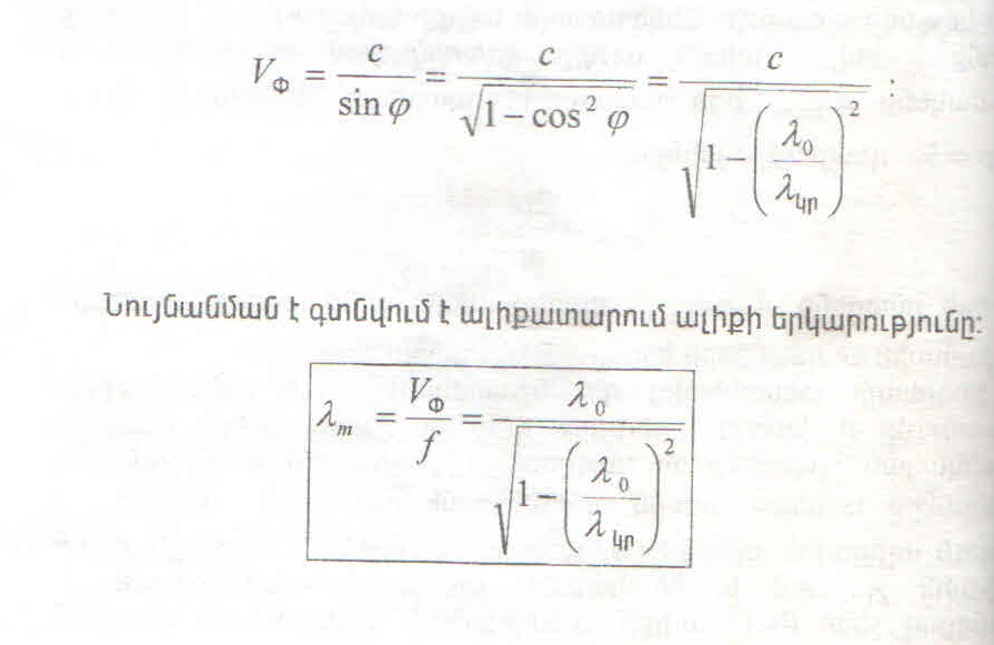 Ալիքատարում ալիքի երկարությունը